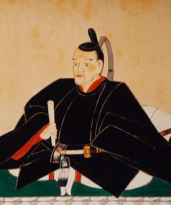 池田斉政（第10代岡山城主）、Ikeda Narimasa(the 10th Okayama castellan)